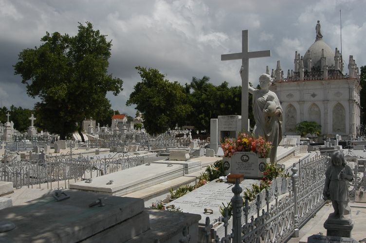 Cuba, september 2005, info in de Metadata